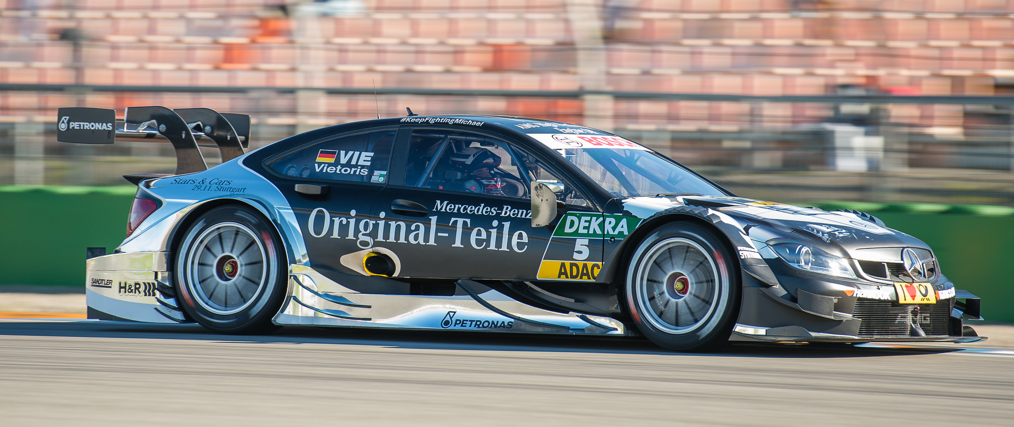 Christian Vietoris,DTM,Deutsche Tourenwagen Masters,HWA AG,Hockenheimring,Motorsport,Original-Teile Mercedes AMG C-Coupe